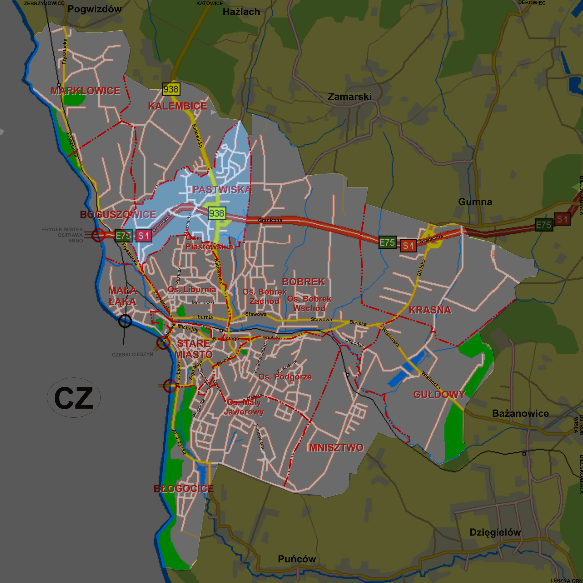 Pastwiska, dzielnica Cieszyna